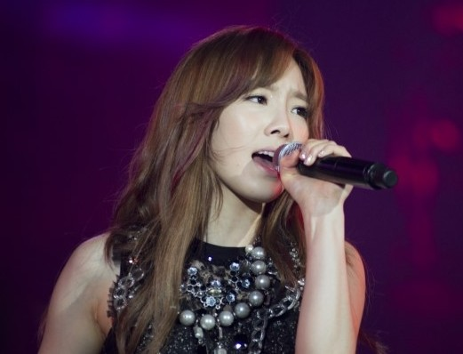 2012년 7월 12일 여수 엑스포 팝 페스티벌에서 태연.